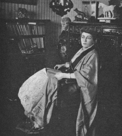 Madame Myriam Harry chez elle, portrait photographique de l'écrivain Myriam Harry à Paris en 1904, publié dans la Revue universelle en 1905